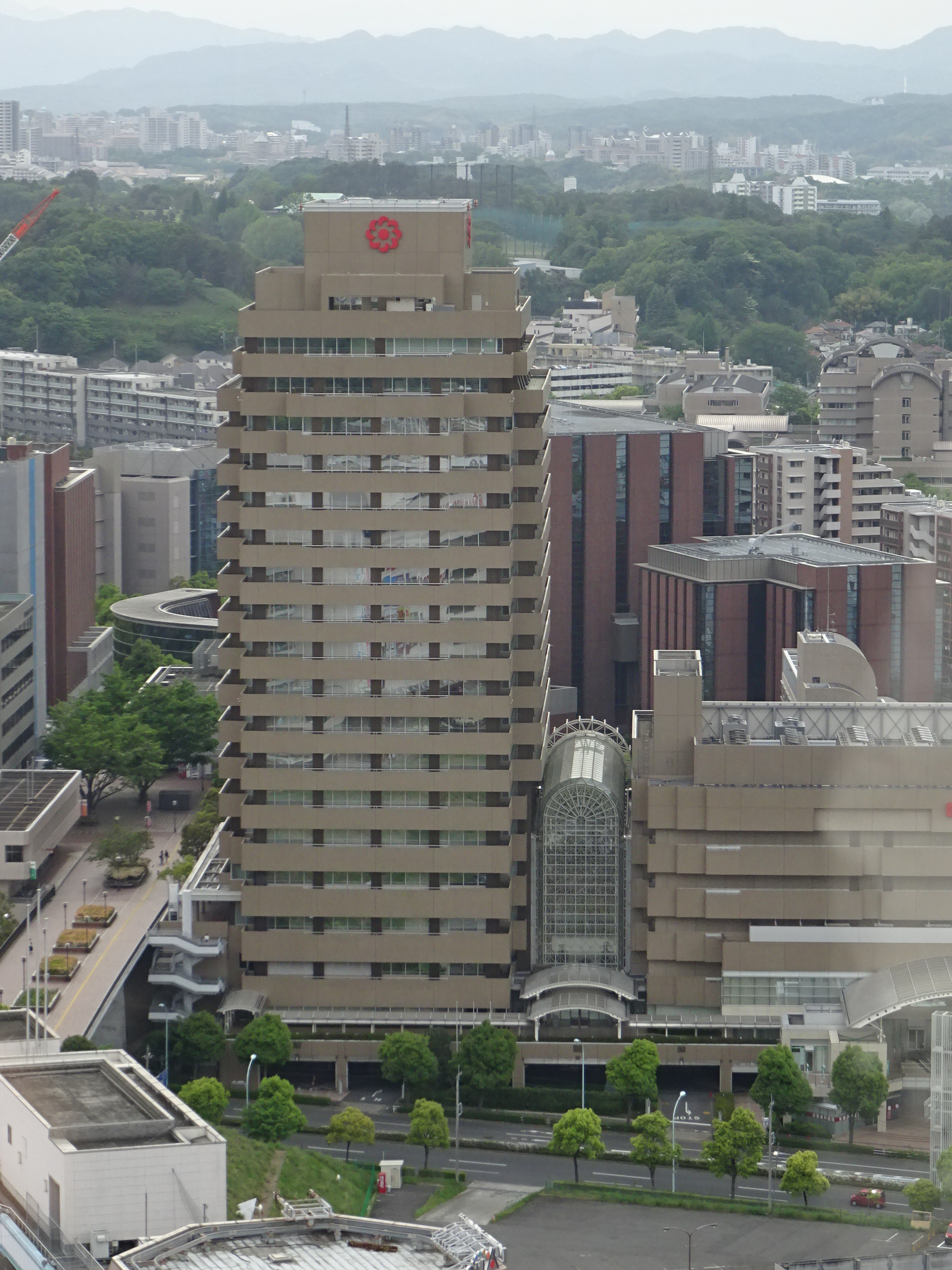 多摩市にある朝日生命多摩本社。2015年5月16日に多摩センター、ベネッセビル展望台より撮影。